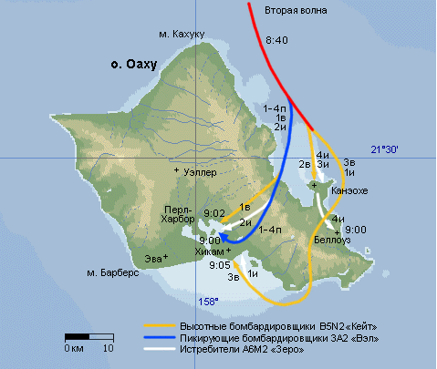 Вторая волна японского авиаудара по базе Перл-Харбор